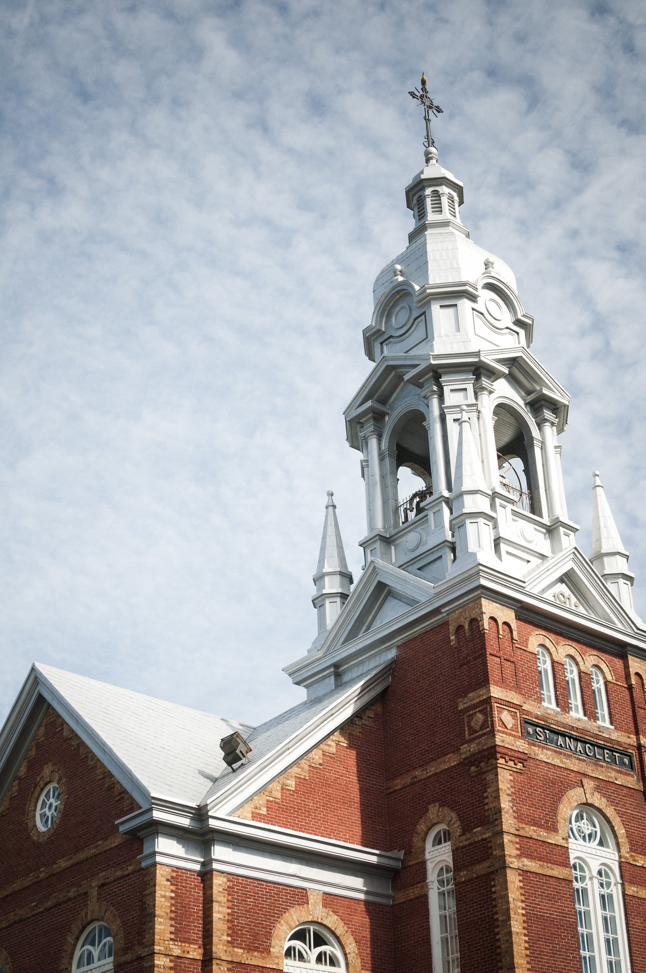 Église de St-Anaclet-de-Lessard à l'automne 2015